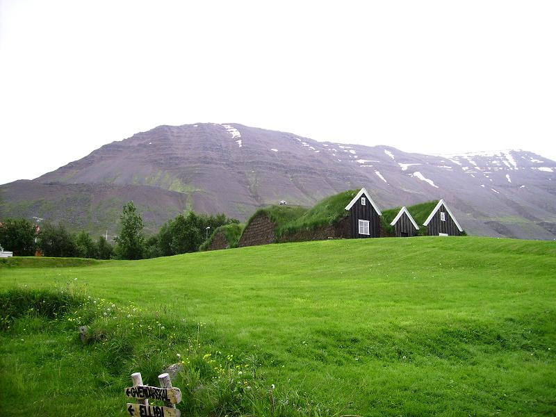 Turf Houses in Hólar, Skagafjörður, Iceland.